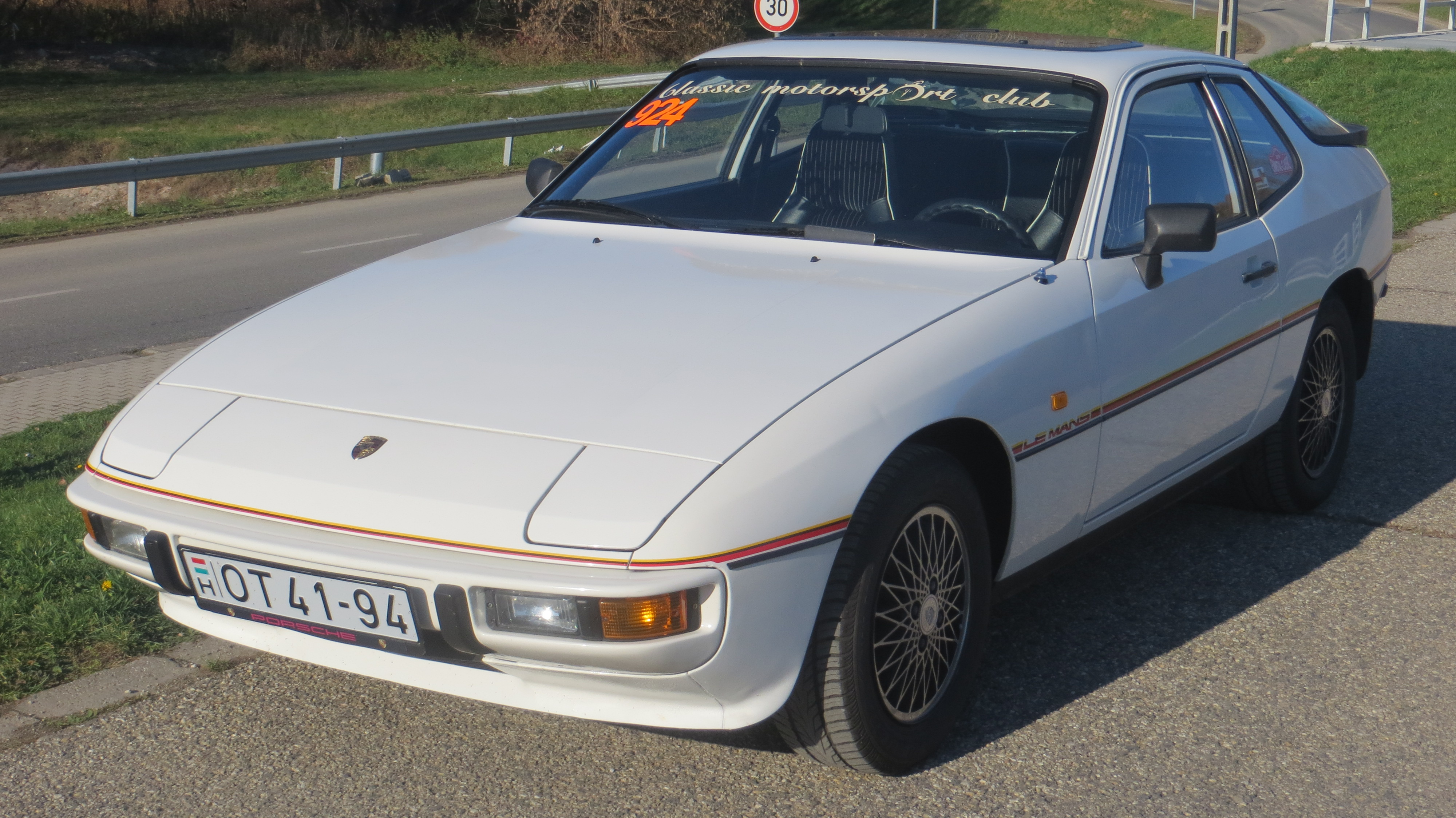 Ez a különleges modell a Porsche Le Mans-i 24 órás autóversenyeken elért hatalmas sikerei előtti tisztelgés. Összesen 1002 darab (más források szerint 1030) épült a modellből, mindegyik alpesifehér színben, körbefutó sárga-fekete-vörös díszítő csíkkal, az első sárvédőkön ugyanilyen színű Le Mans felirattal. A modellen a 924 Turbo hátsó spoilere van, 6J×15-ATS Turbo-Look keréktárcsák, belül csíkos „Nadelstreifen” kárpitozású Turbo ülések fehér szegéllyel, 36 cm átmérőjű négyküllős bőrkormány, bőr váltógomb, az ajtóküszöbön fekete alapon fehér 924 felirat. A gépkocsihoz többféle extrát is lehetett rendelni, elektromos ablakot, elektromosan állítható külső tükröket, hátsó ablaktörlőt, fényszórómosót, légkondicionálót és kivehető targatetőt is. Jobbkormányos kivitelben 100 darab készült.